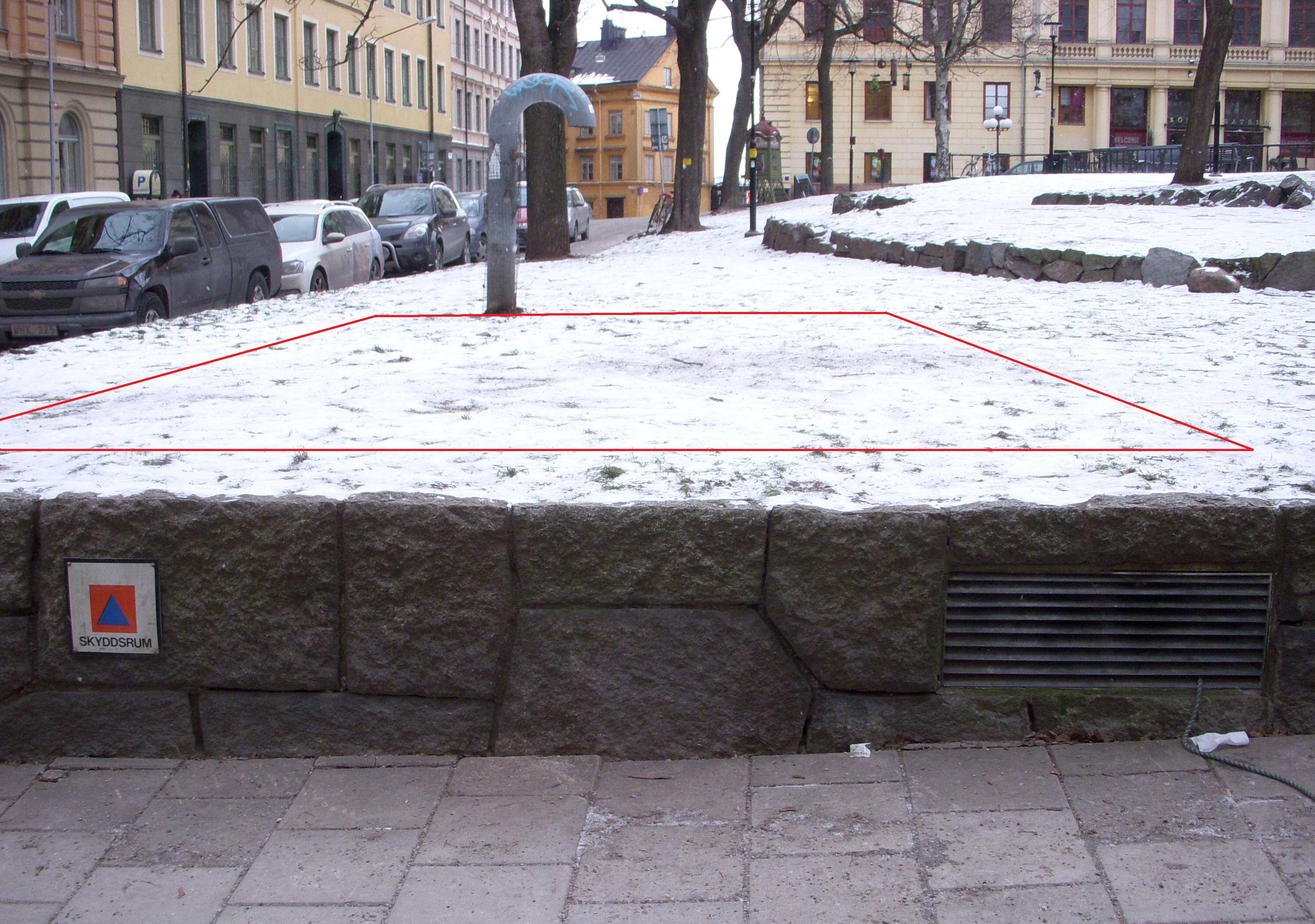 Katarinabergets skyddsrum, ingång i parken vid Mosebacke torg, markerad med rött